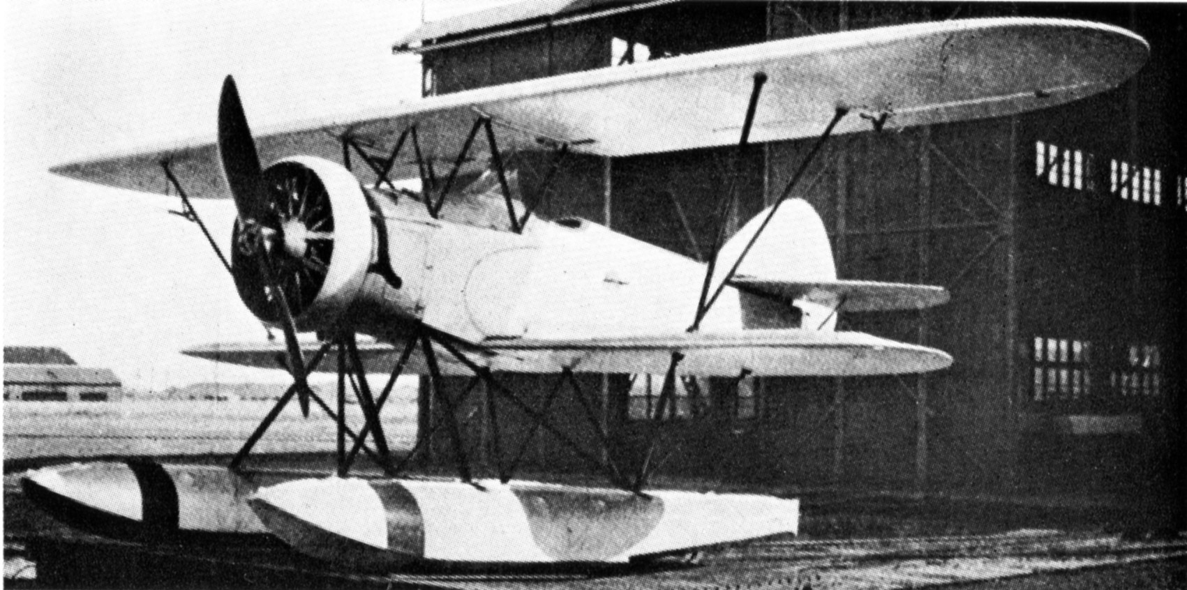 愛知AB-3単座水上偵察機。